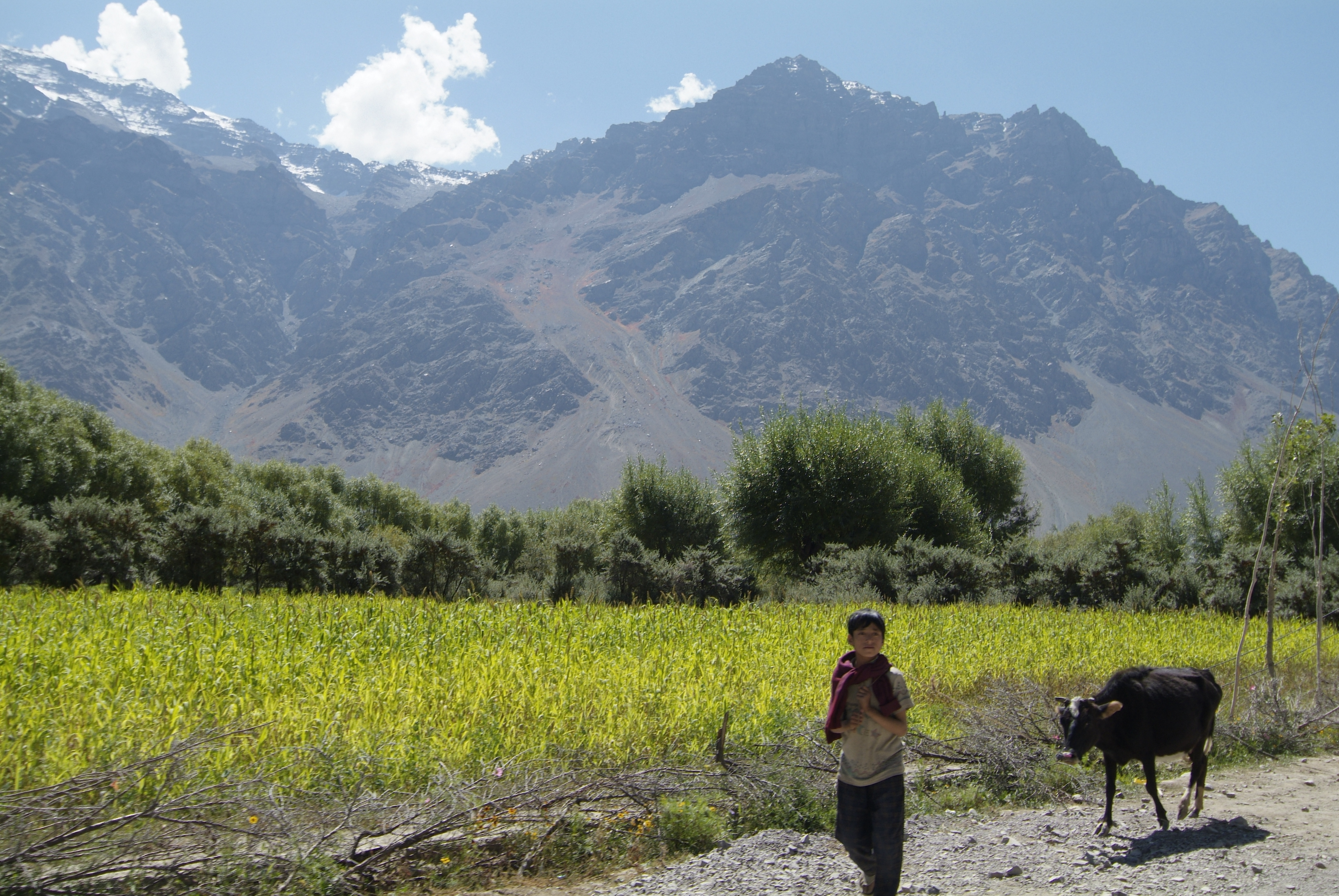 Farming in Suru Valley, Ladakh